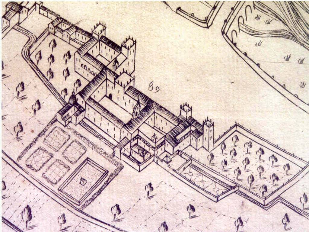 Detall del mapa fet per Antonio Mancelli de la Ciutat de València, on es pot veure com era el Palau del Real l'any 1609.